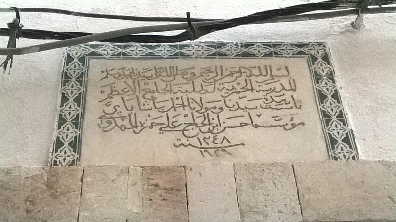 La médina de Tunis مدينة تونس العتيقة